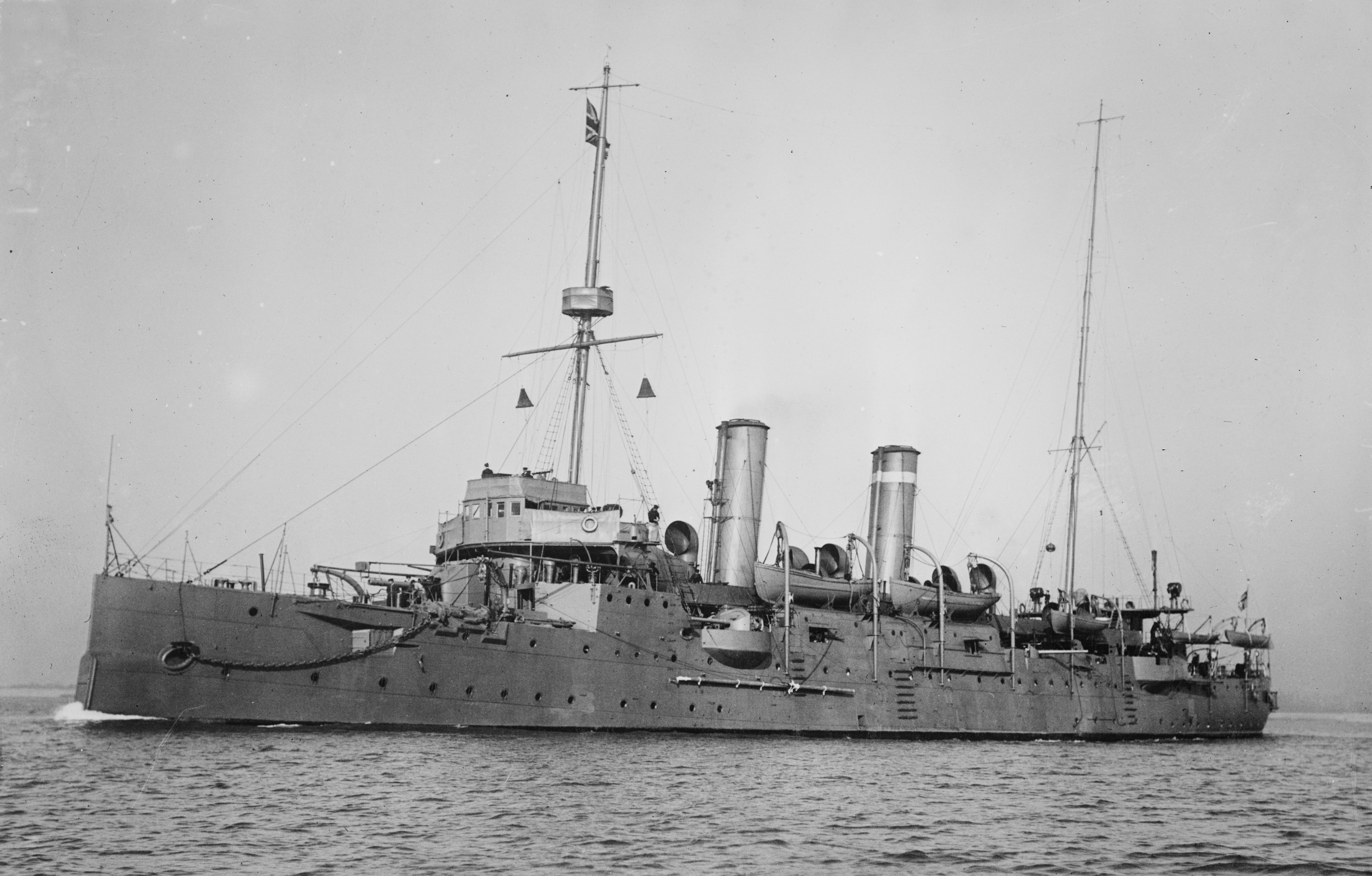 HMS Bonaventure